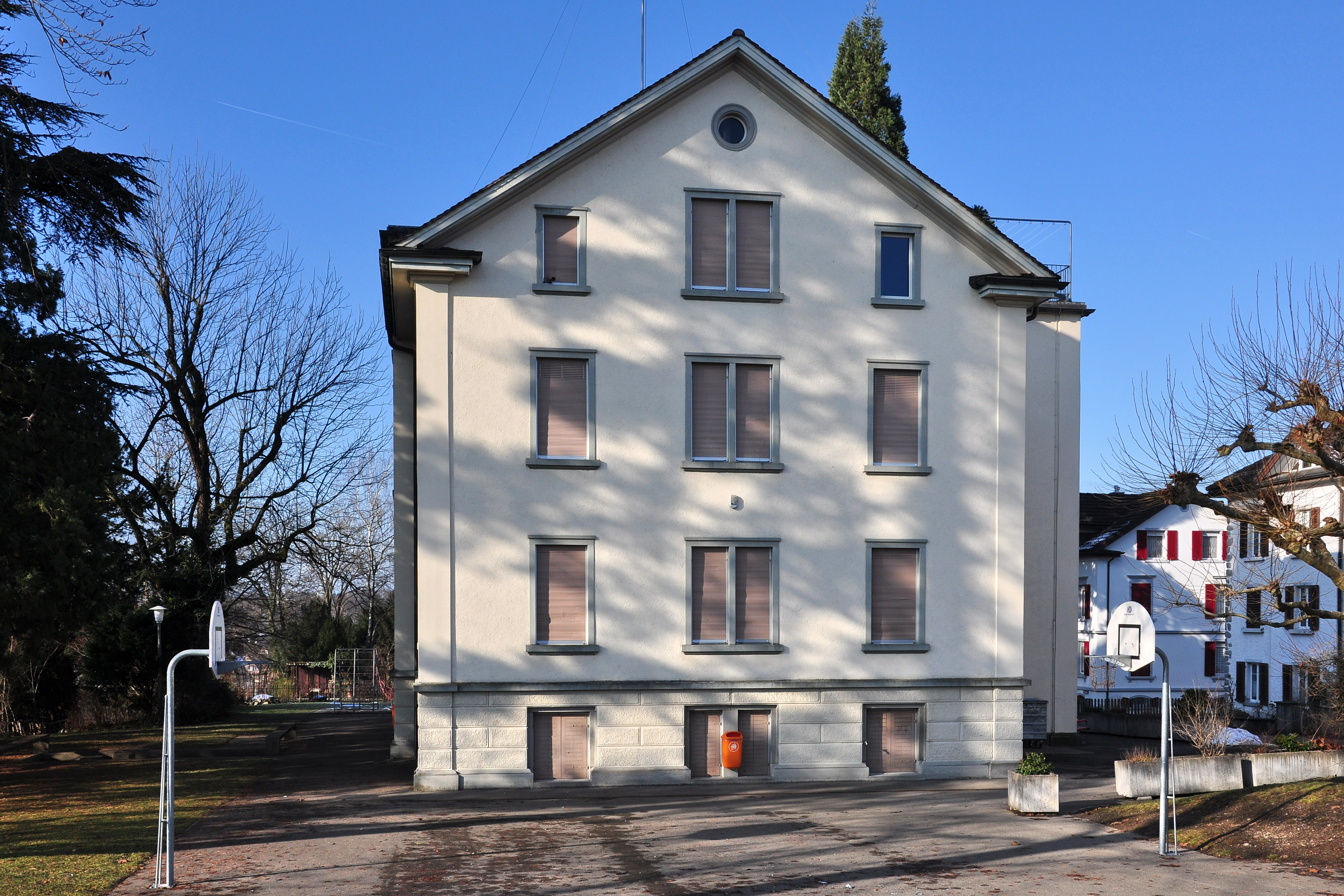 Schlossberg in Rüti (Switzerland)